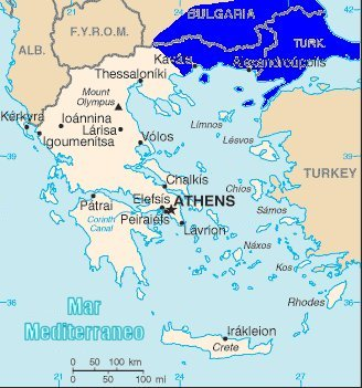 Extraída de y luego modifcada por julgon